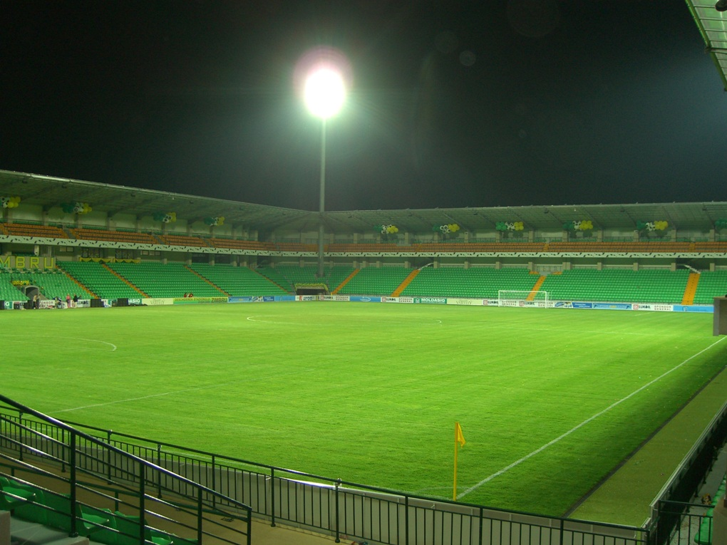 Zimbru stadium in Chisinau, Moldova